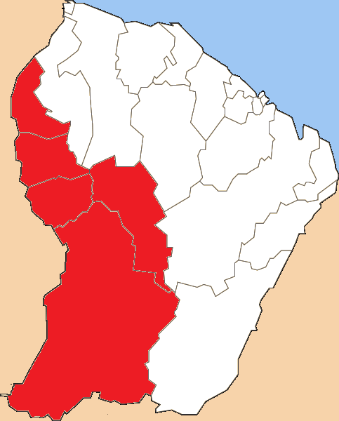 Situation du canton dans le département de la Guyane